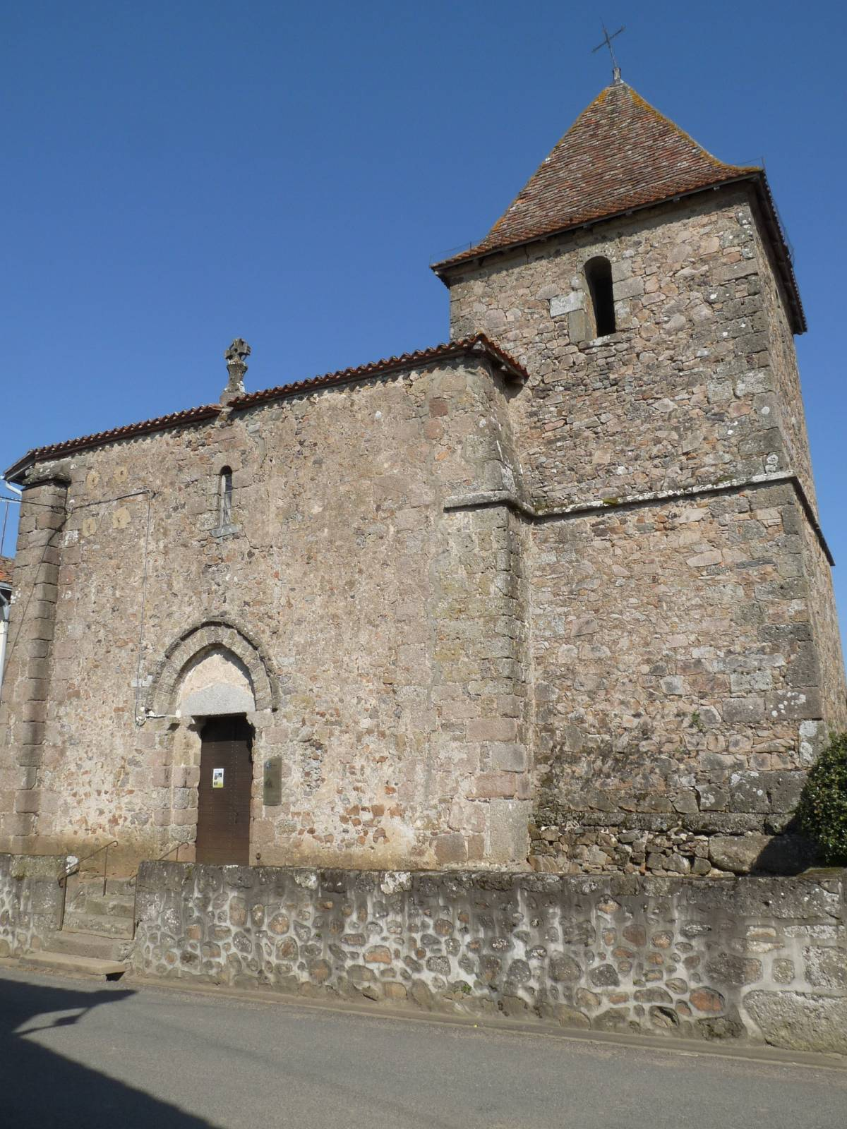 église de Grenord, Chabanais, Charente, France